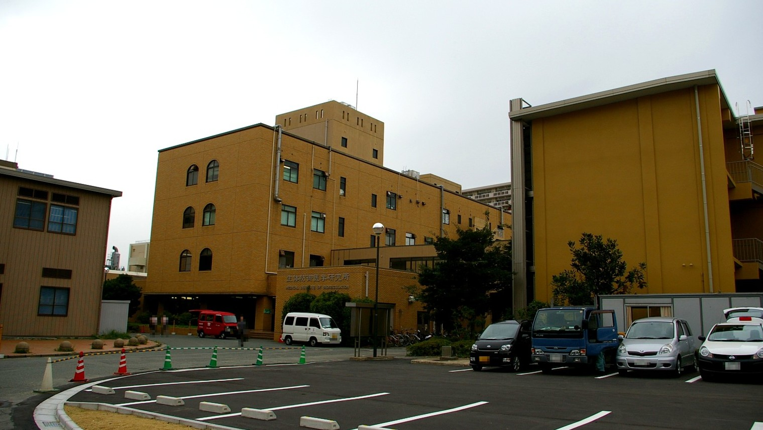 福岡市内